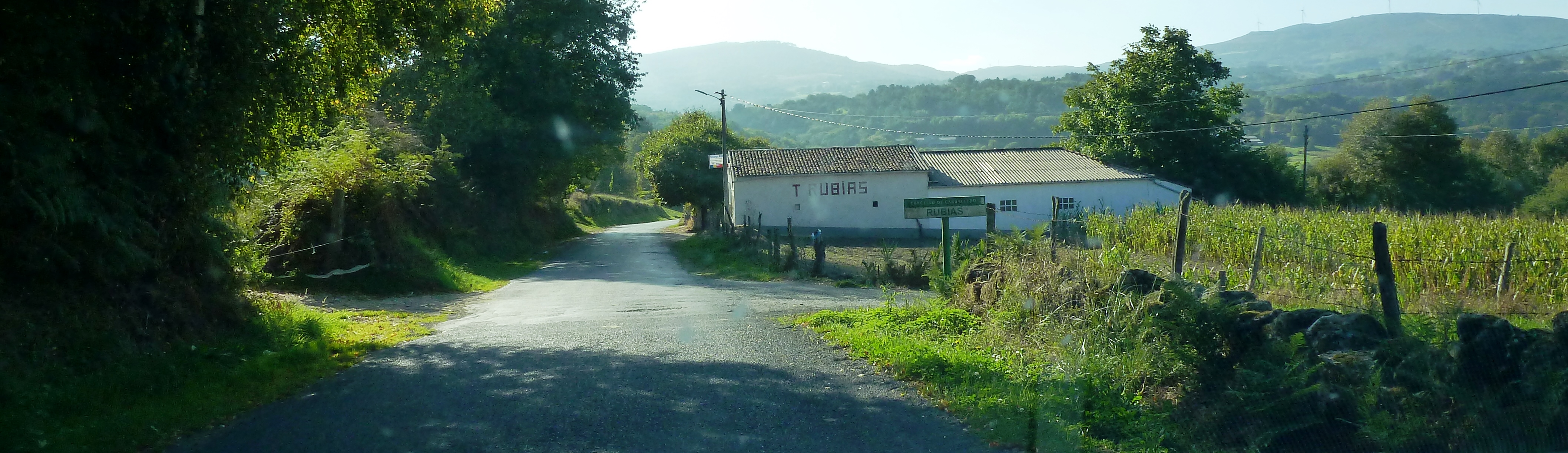 Rubiás, Santa Mariña, Carballedo